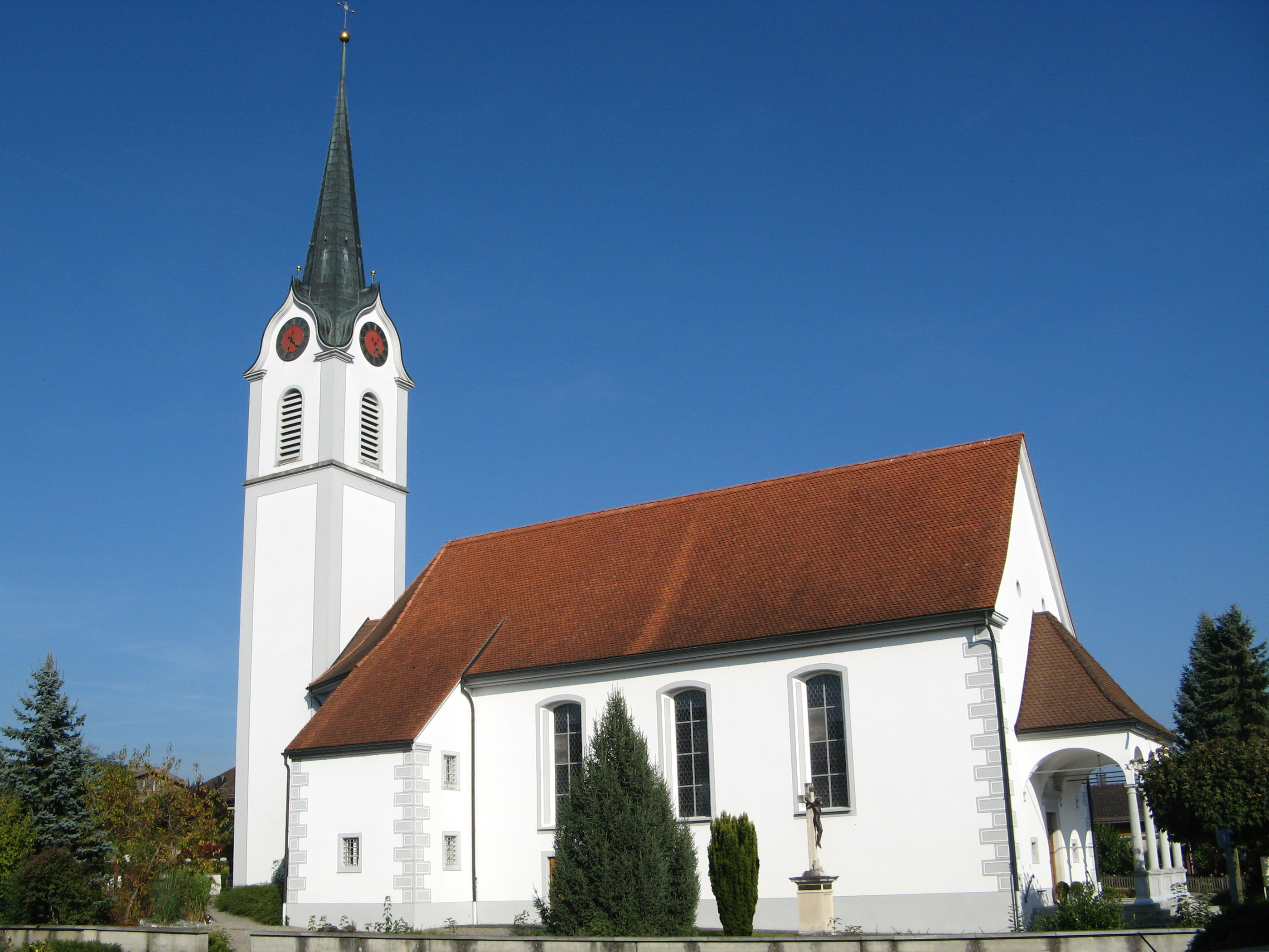 Pfarrkirche St. Germanus in Abtwil, Aussenansicht